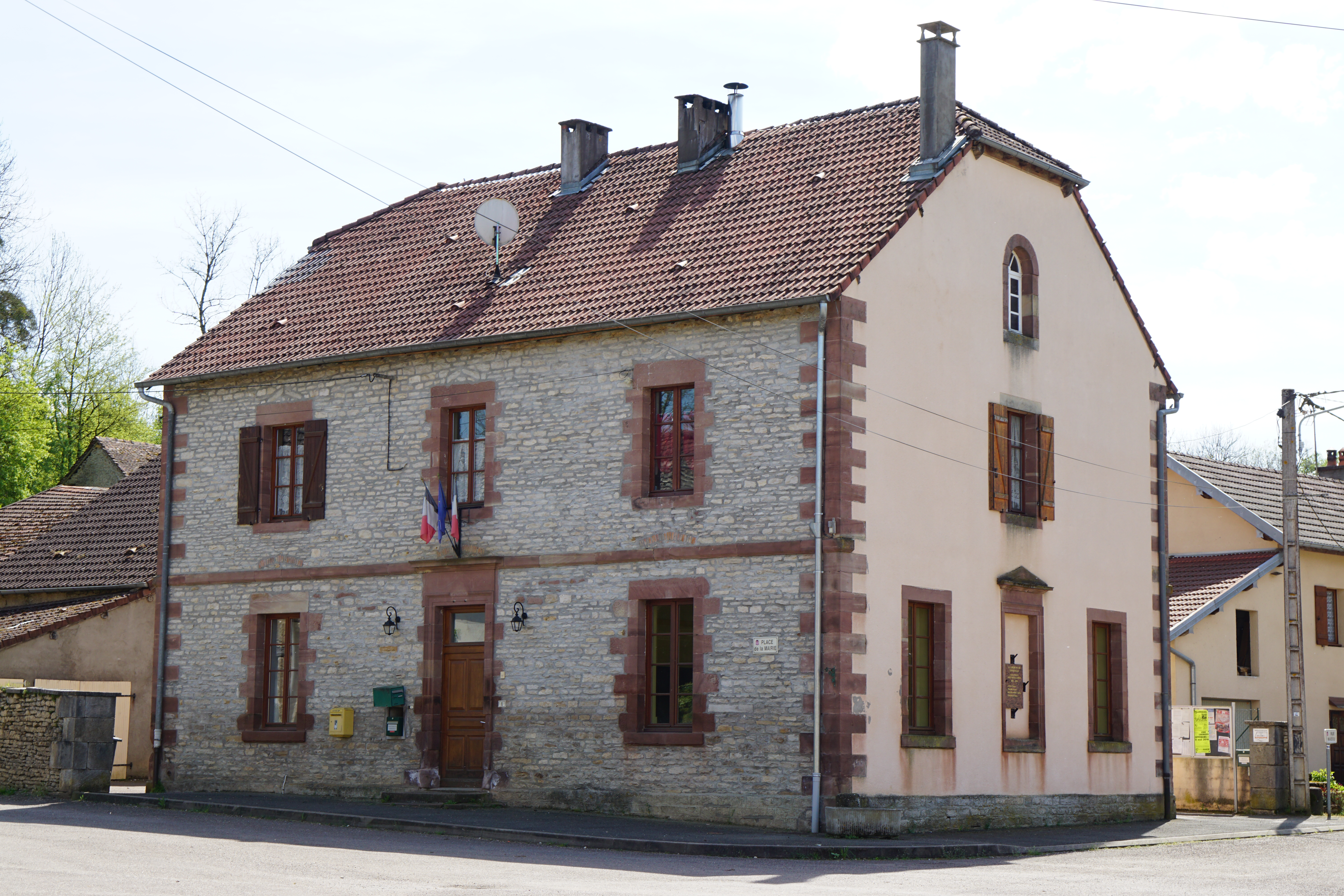 Mairie de Longevelle.